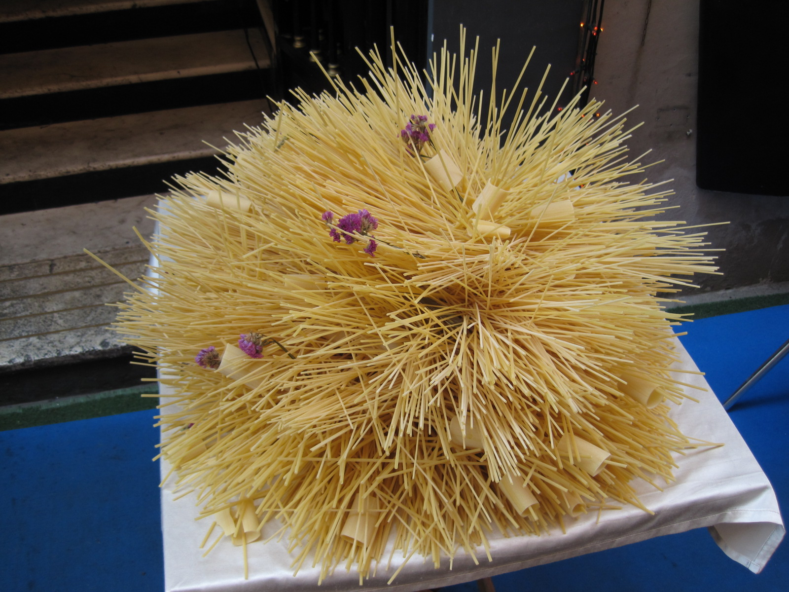 Spaghetti